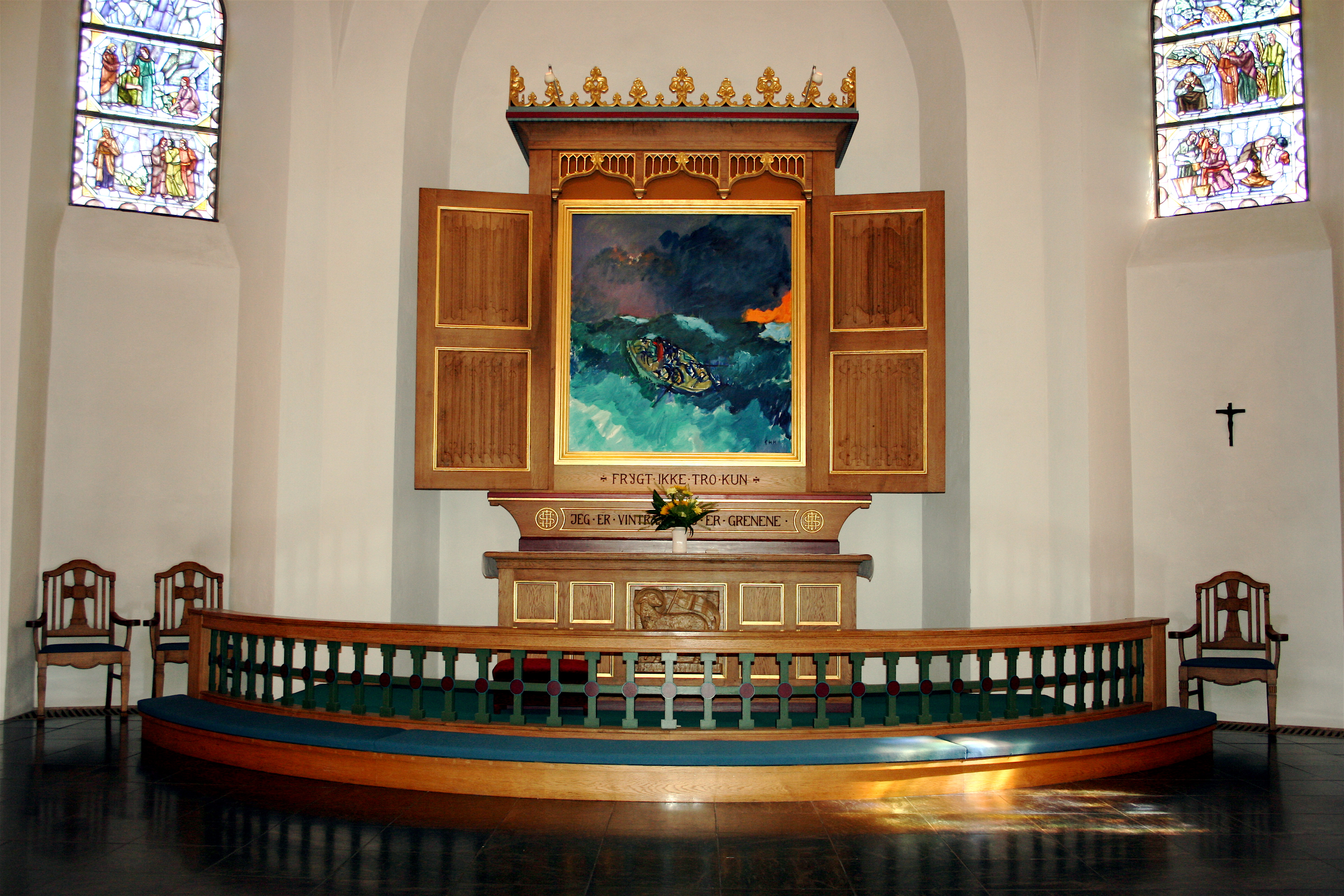 Rønne Kirke alteret